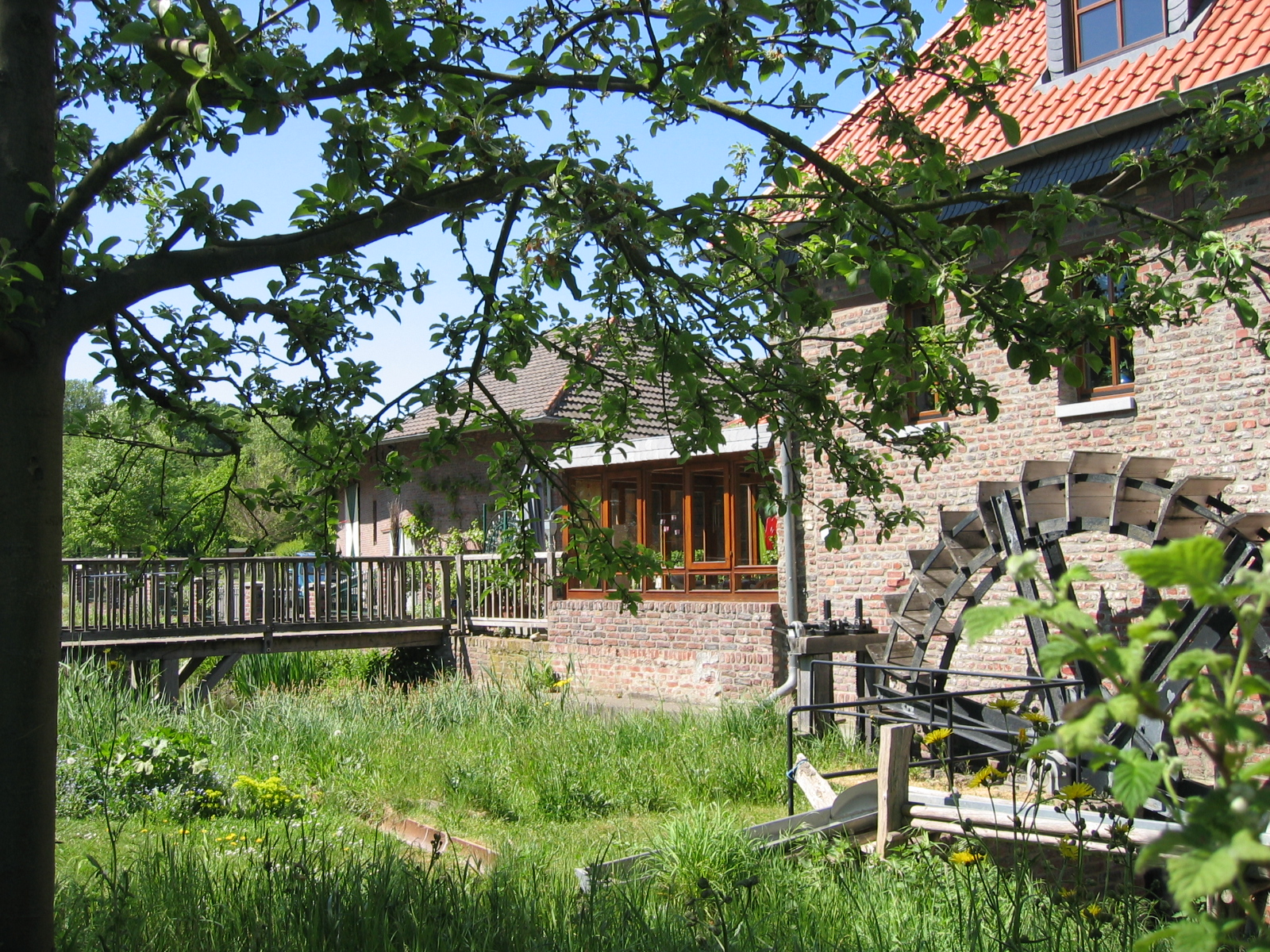 Wurmtal April 2007